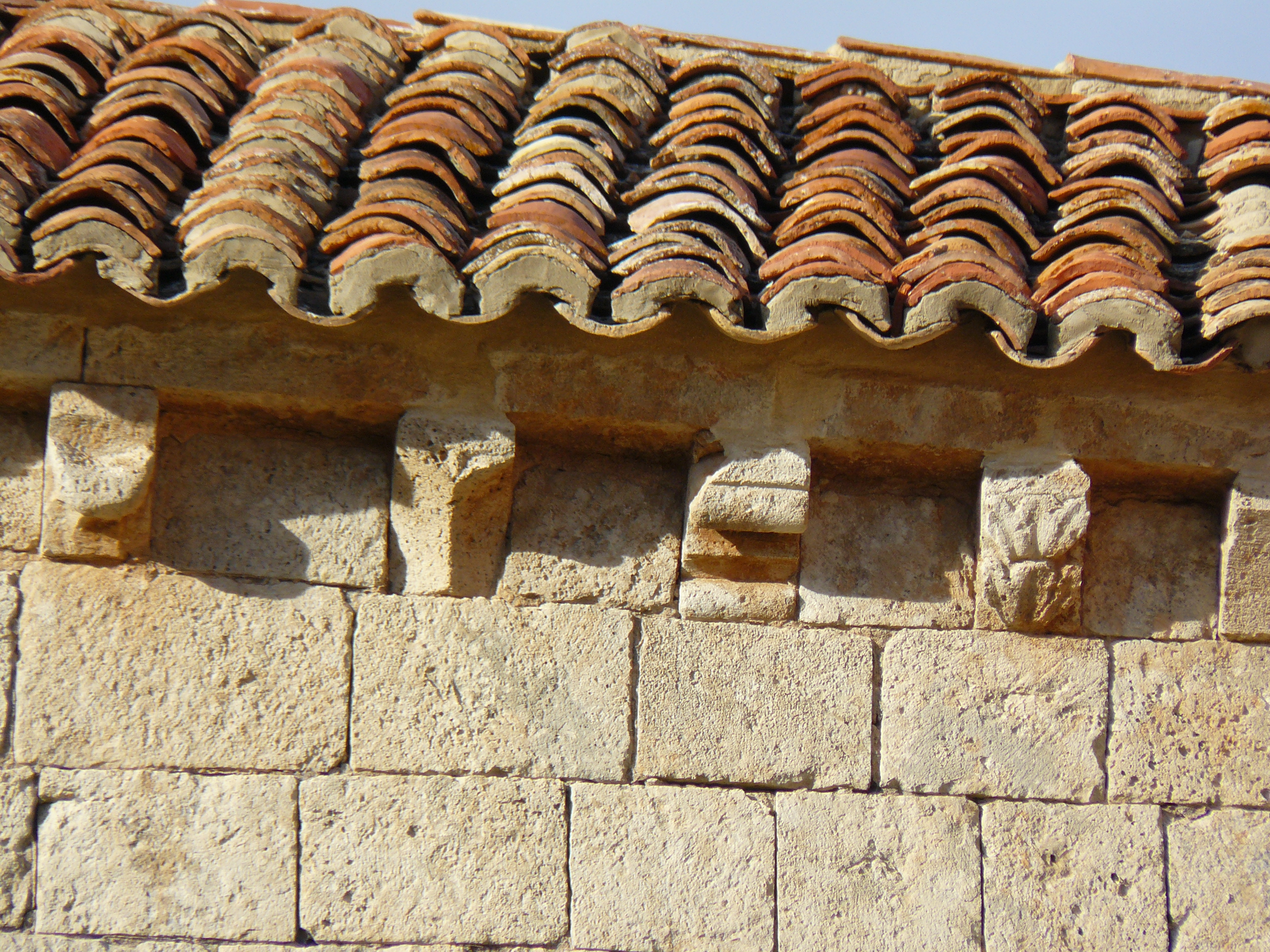 Bordecorex, Soria.